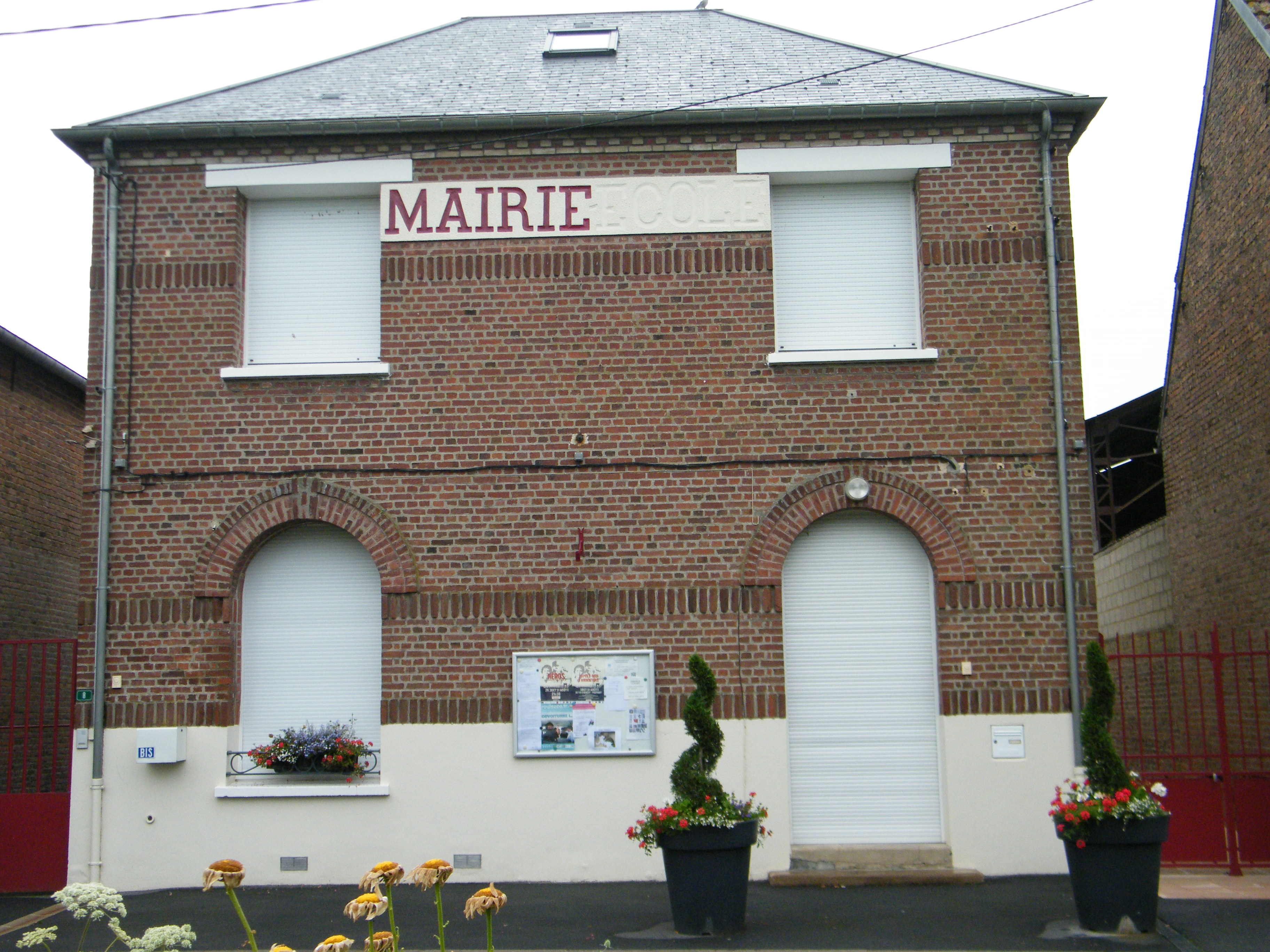 Mairie.